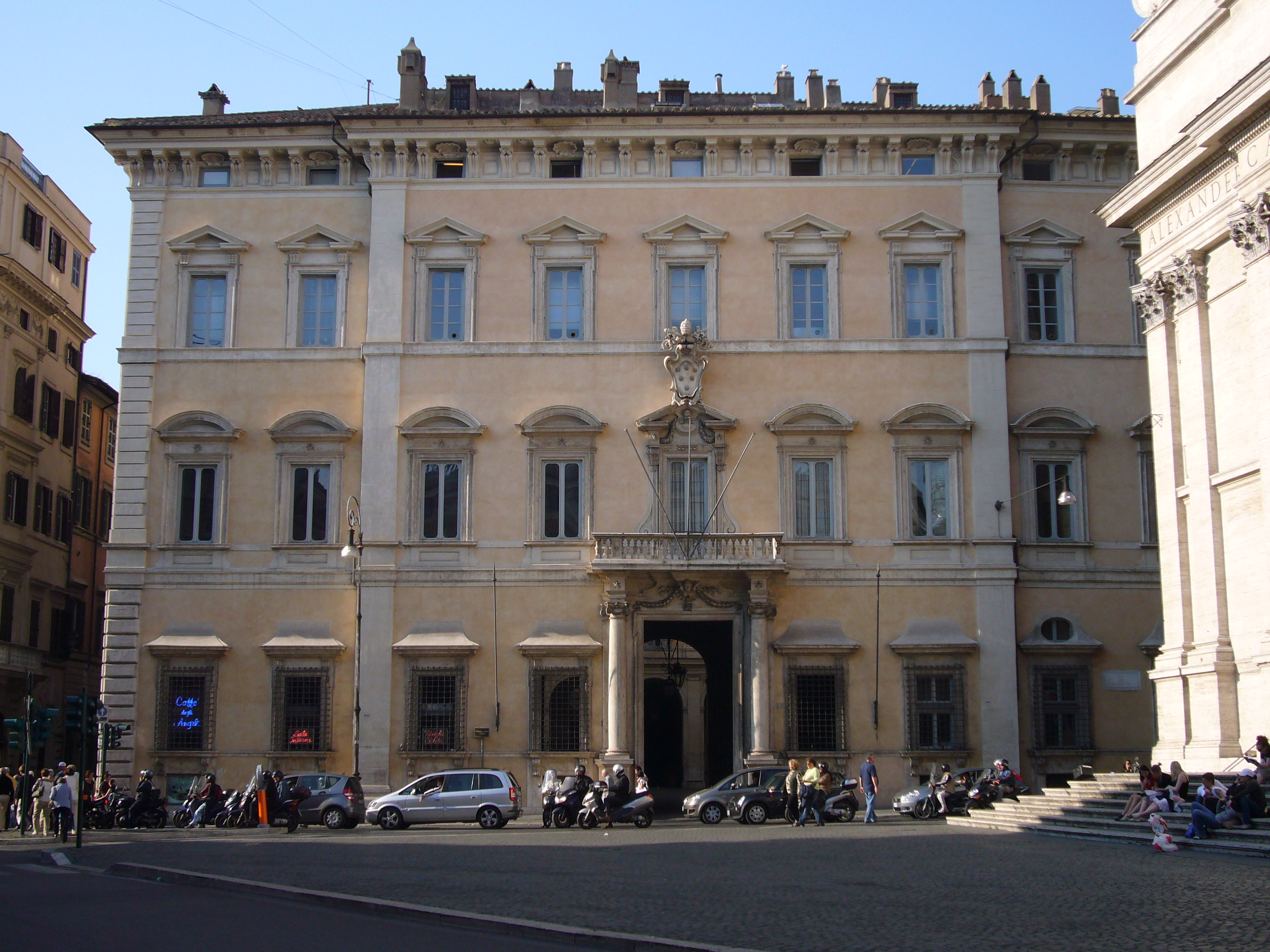 Roma, Palazzo Altieri da piazza del Gesù